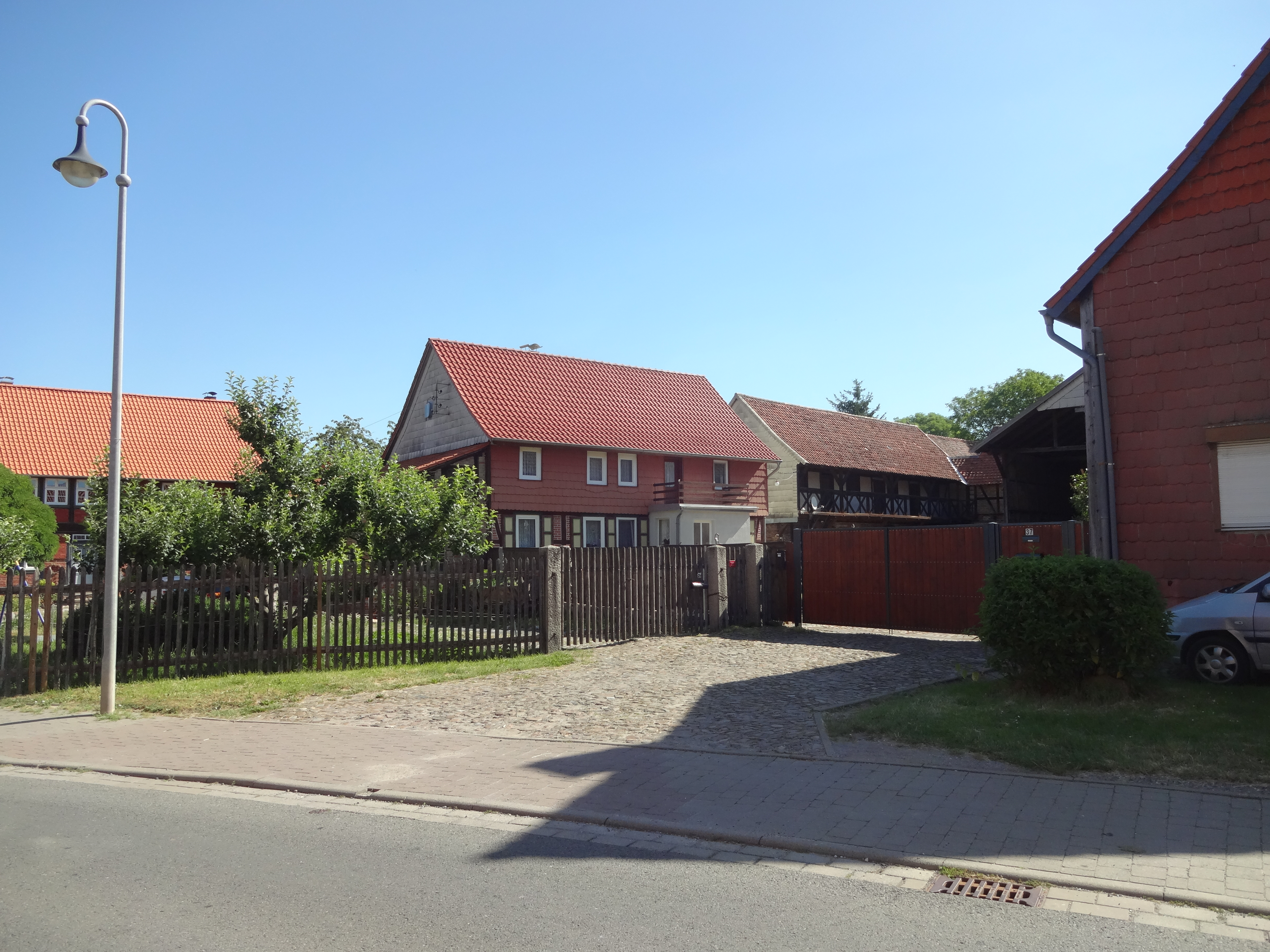 denkmalgeschützter Bauernhof in der Hauptstraße 37 in Langeln, Gemeinde Nordharz